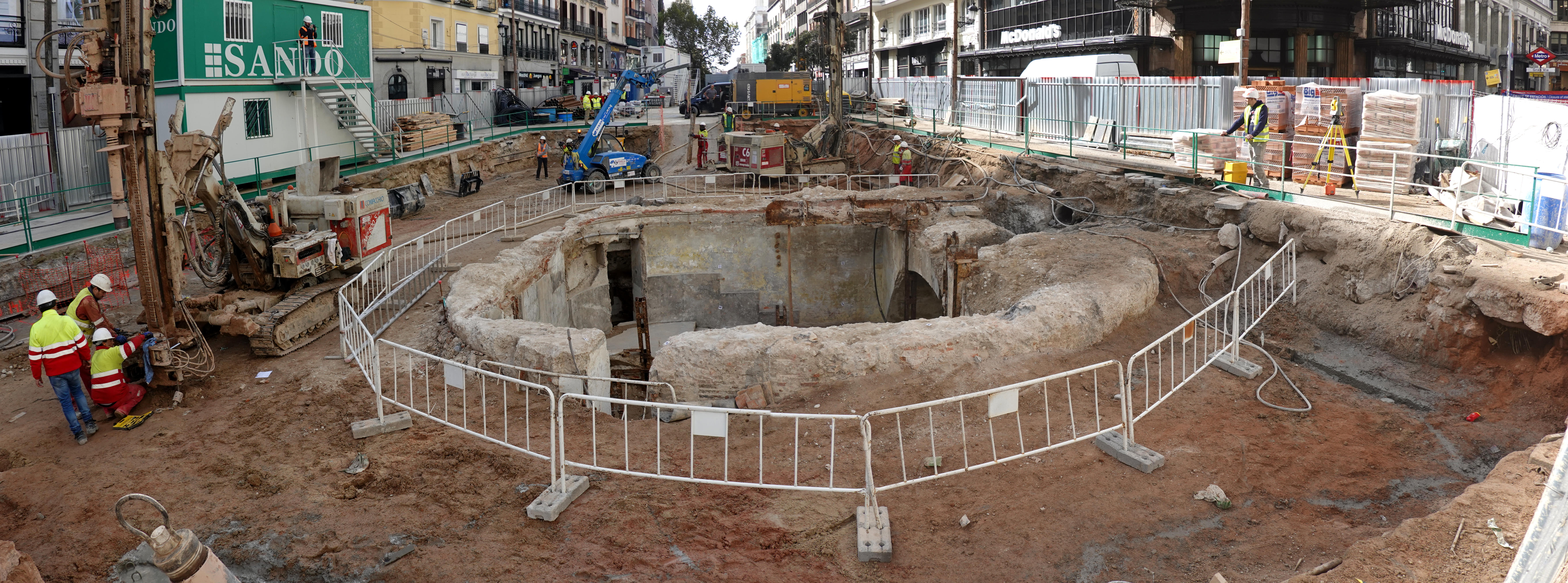 Estado de las obras de recuperación del acceso y recreación del templete de la Red de San Luis